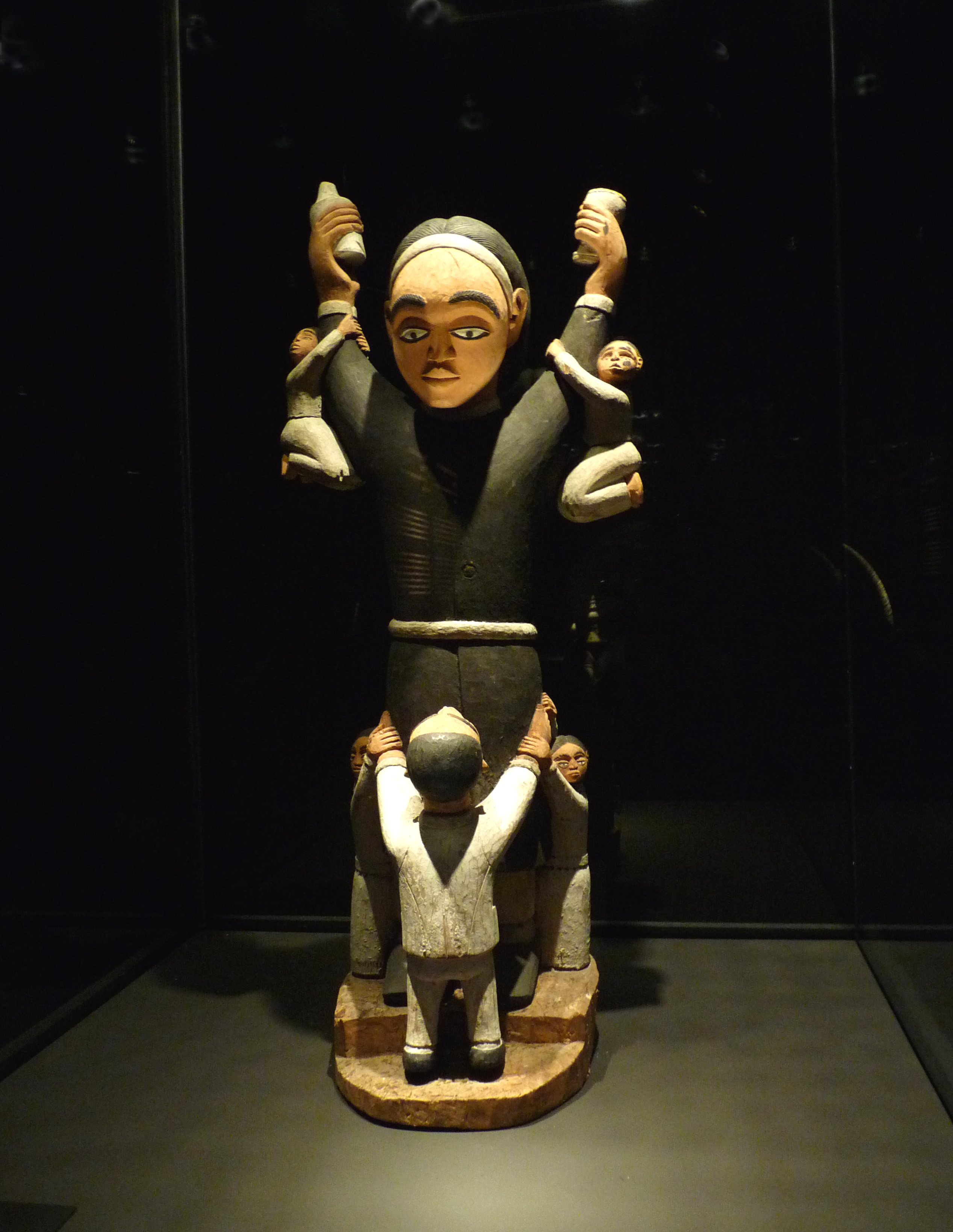 Figurengruppe mit Mönch, Nigeria, Lagos, 2. Hälfte 19. Jahrhundert; Afrikaabteilung, Ethnologisches Museum Berlin, Inv. Nr. III C 1368 (?), Sammlung Hugo Schilling, erworben 1881